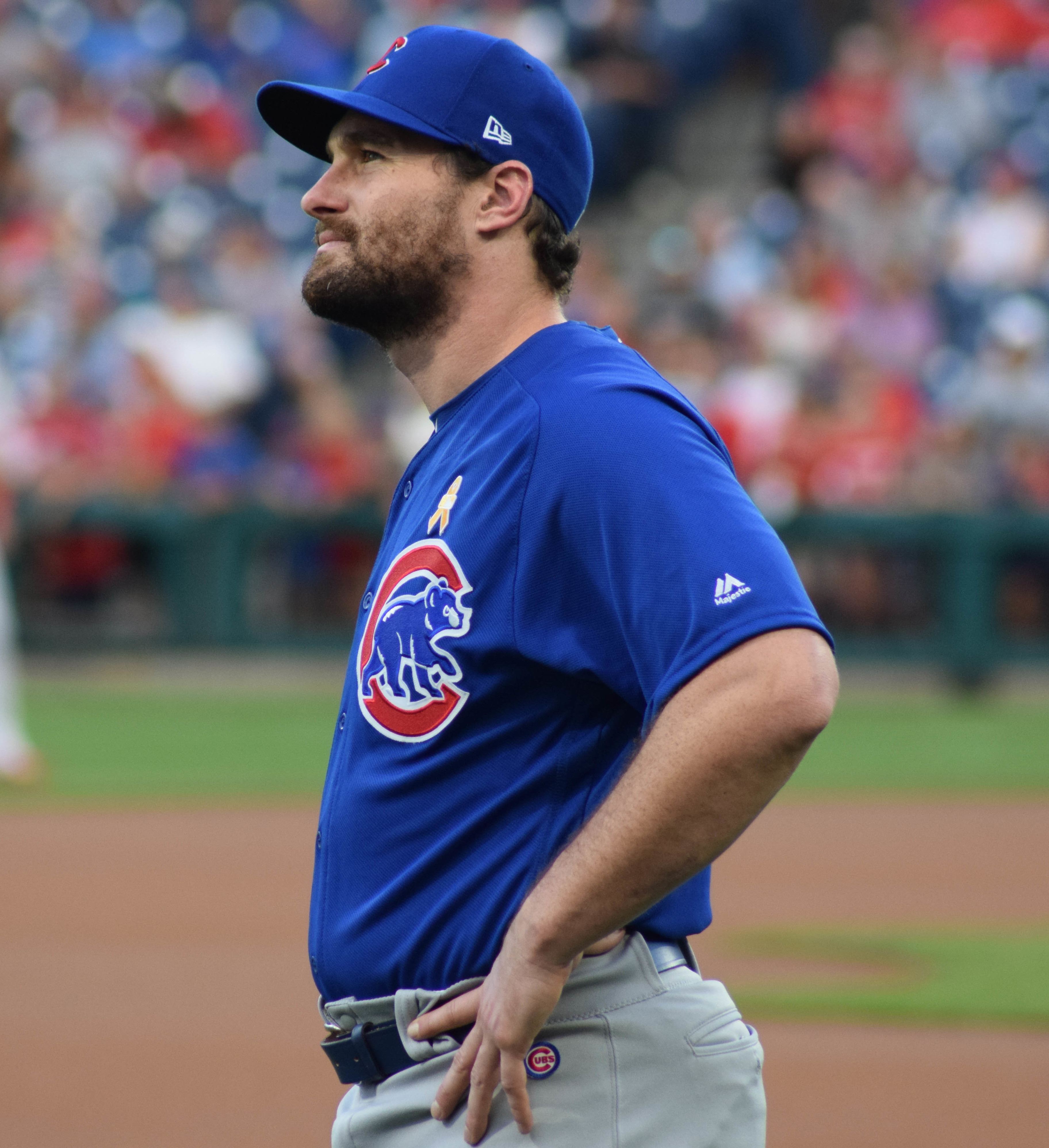 Daniel Murphy